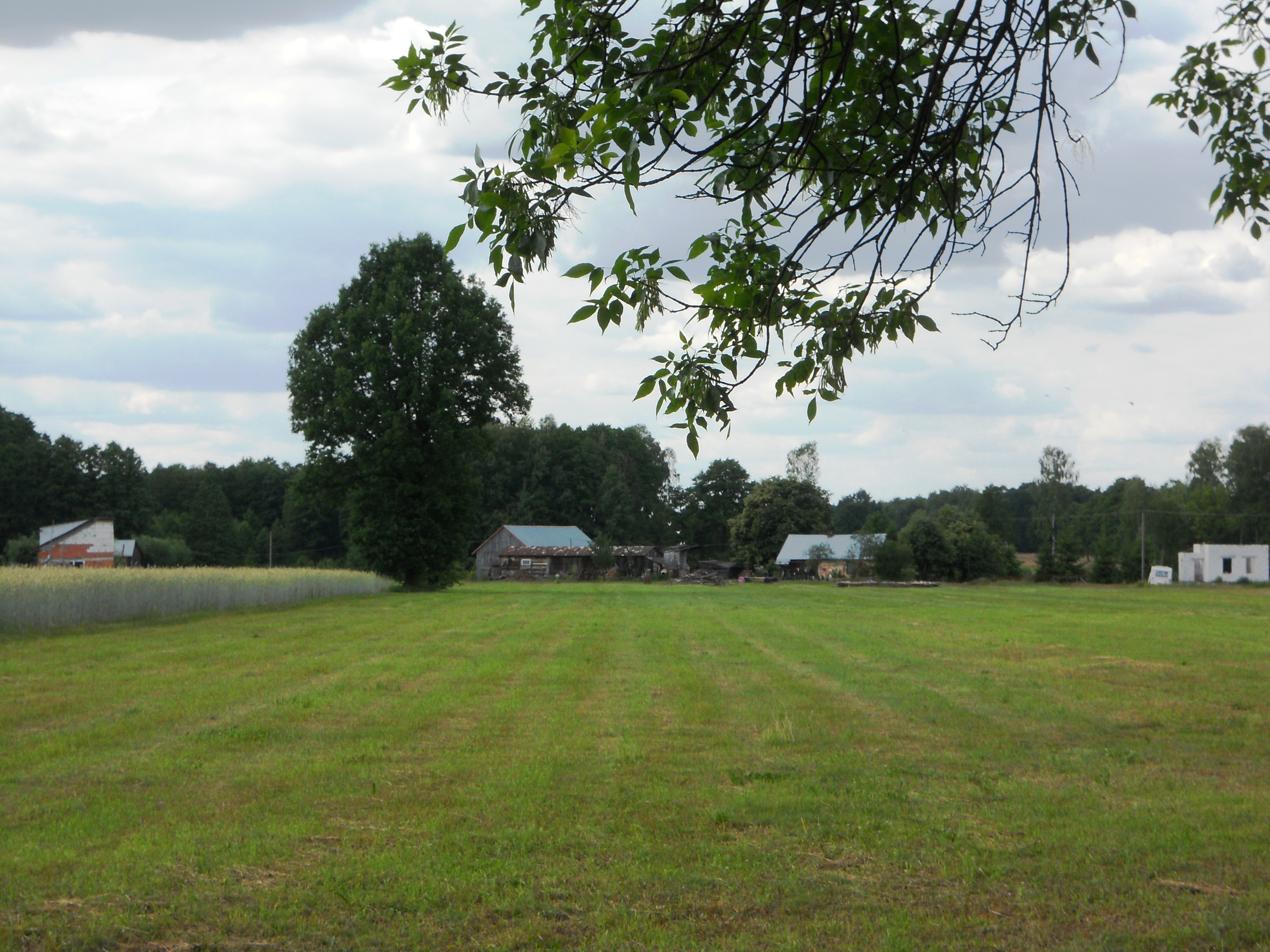 Miejscowość w gminie Mińsk Mazowiecki